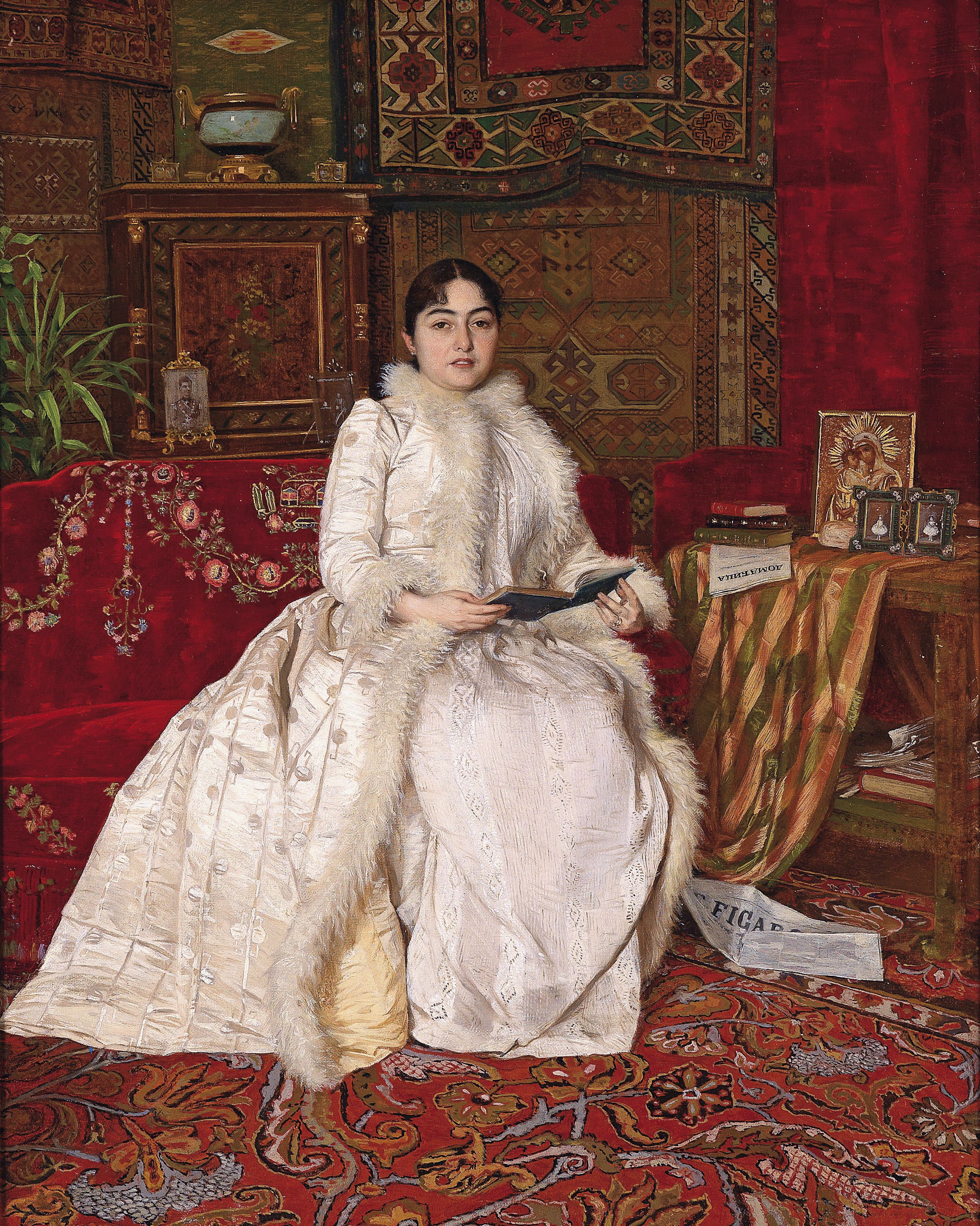 Урош Предић: Краљица Наталија Обреновић Пребачено са Оставе